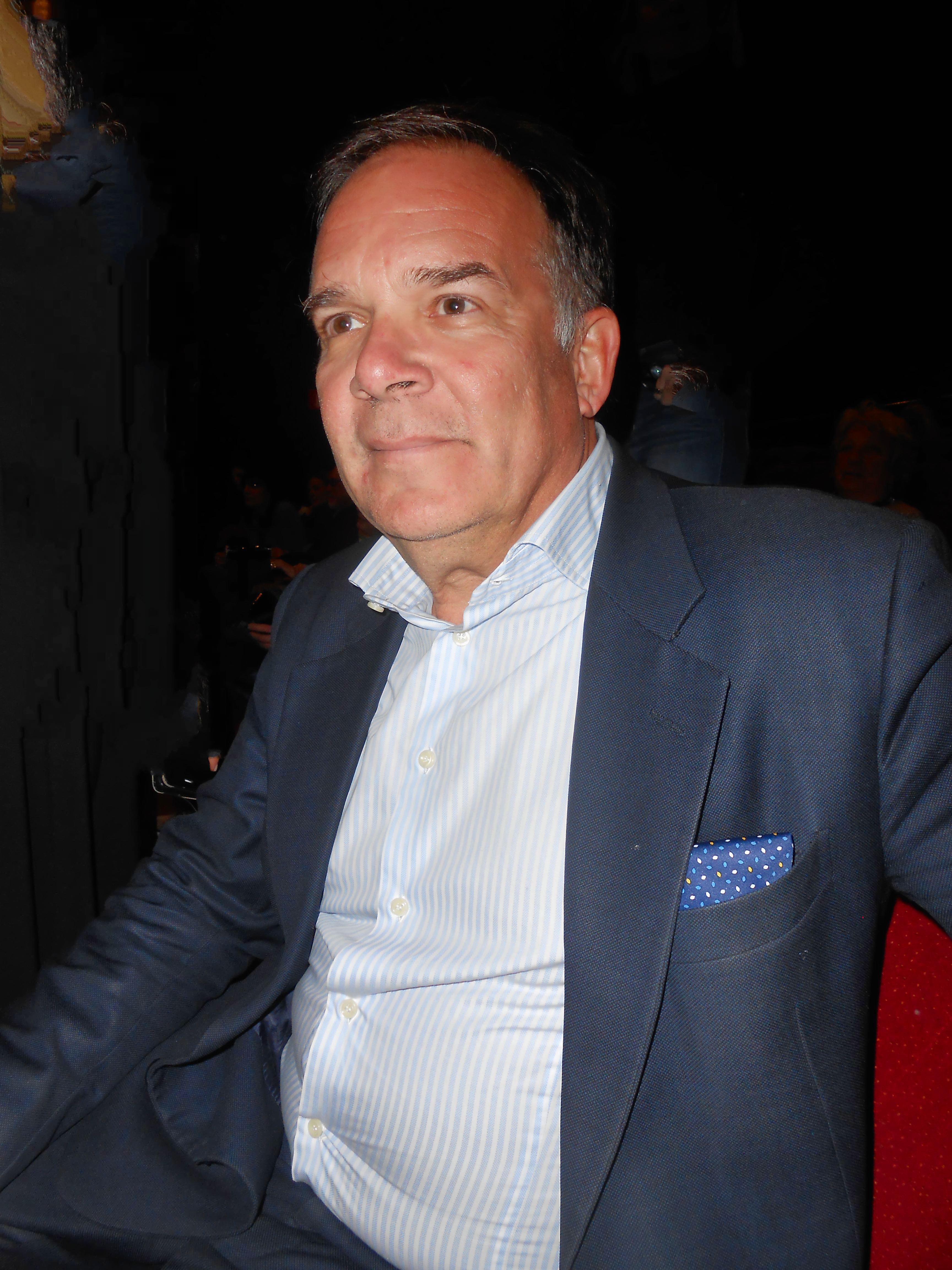 Mario Venezia il 15 marzo 2019 al Cinema Orfeo di Milano per la proiezione e dibattito sul film "La Razzia — Roma, 16 ottobre 1943" di Ruggero Gabbai